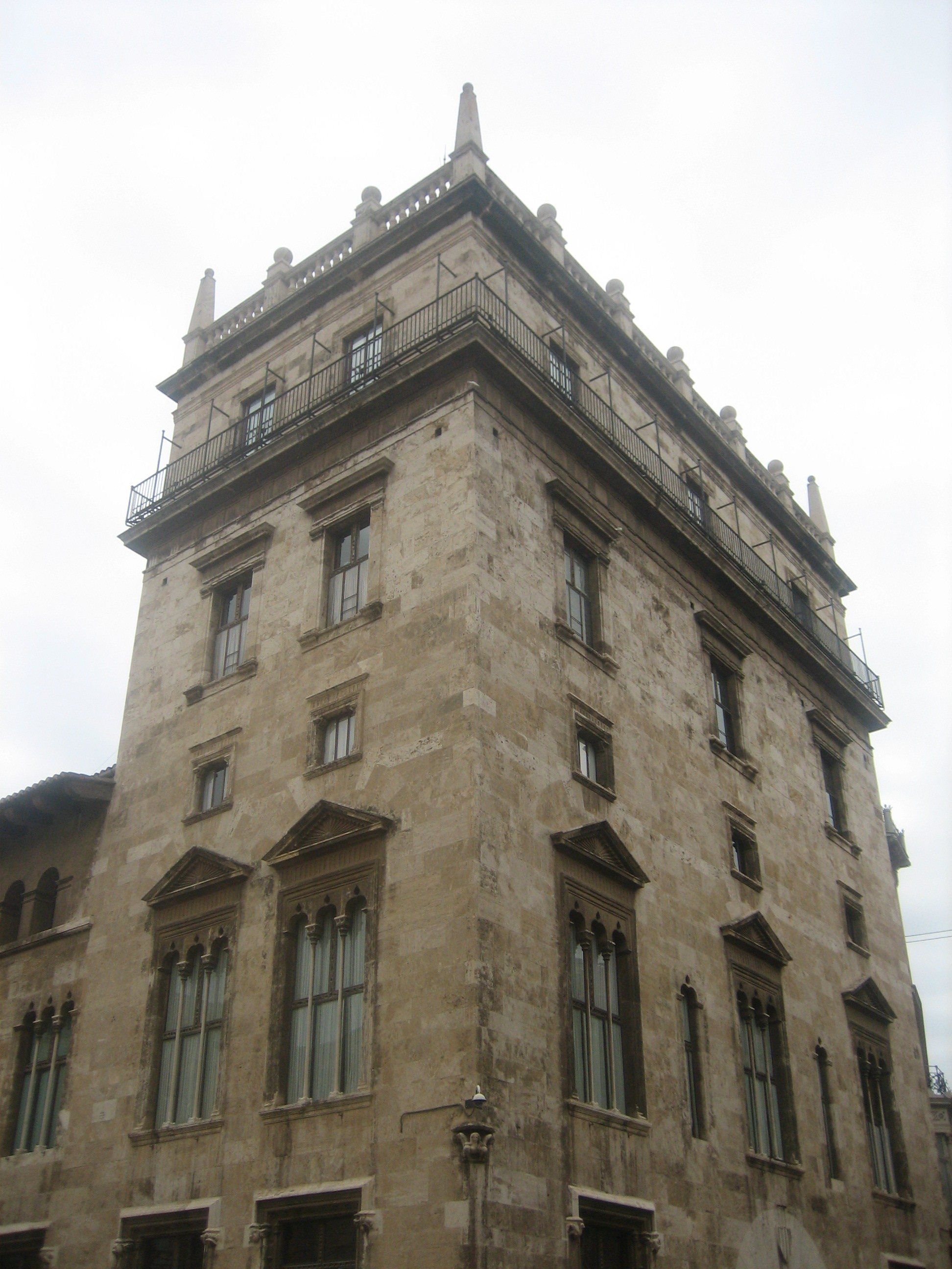 sede de la FCVRE en Valencia